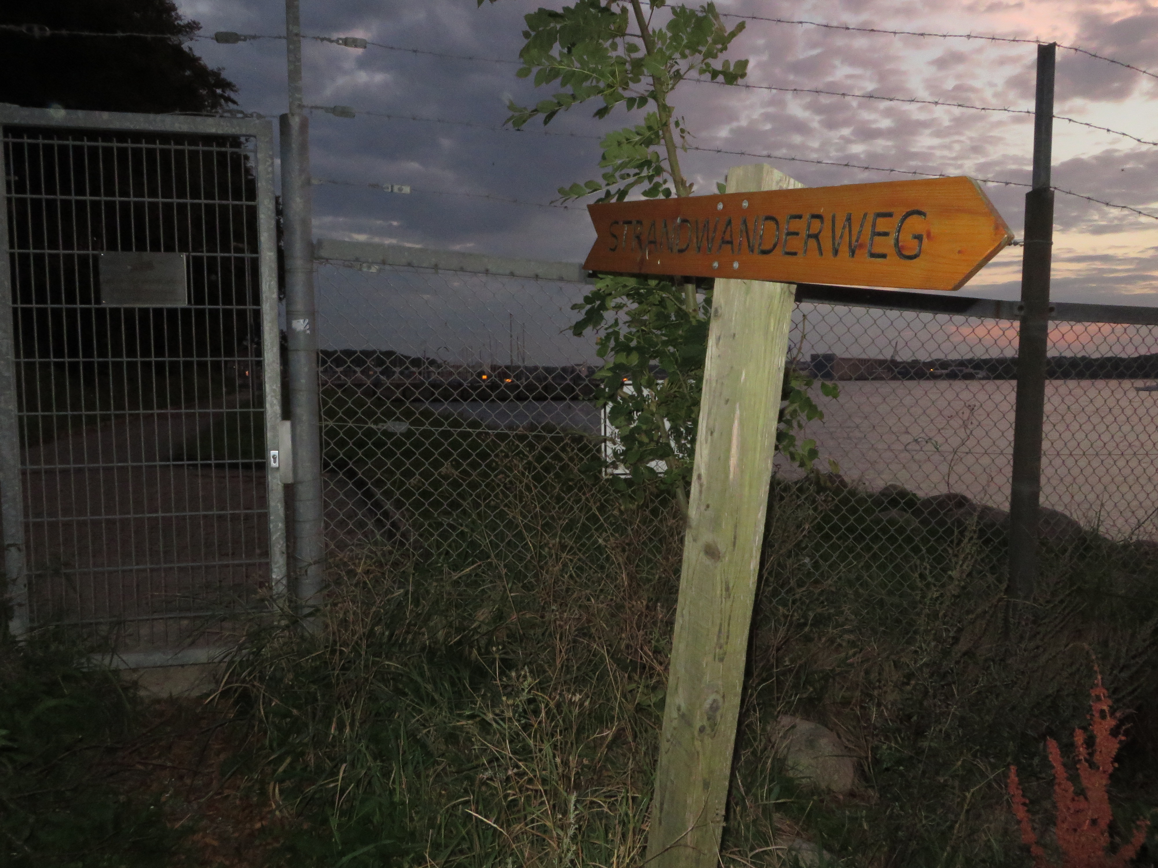 Tor II der Marineschule Mürwik, am Strandwanderweg bei Twedter Mark, Bild 01